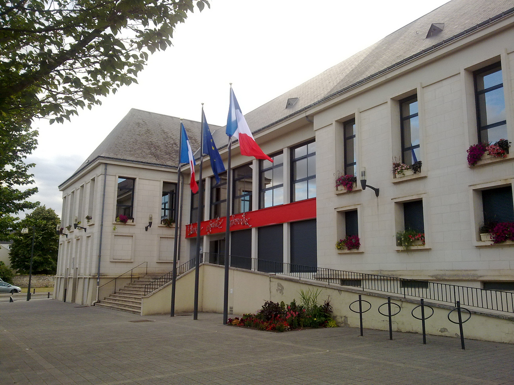 Mairie de La Riche (37520), le jour de l'inauguration de la devise républicaine sur le fronton.